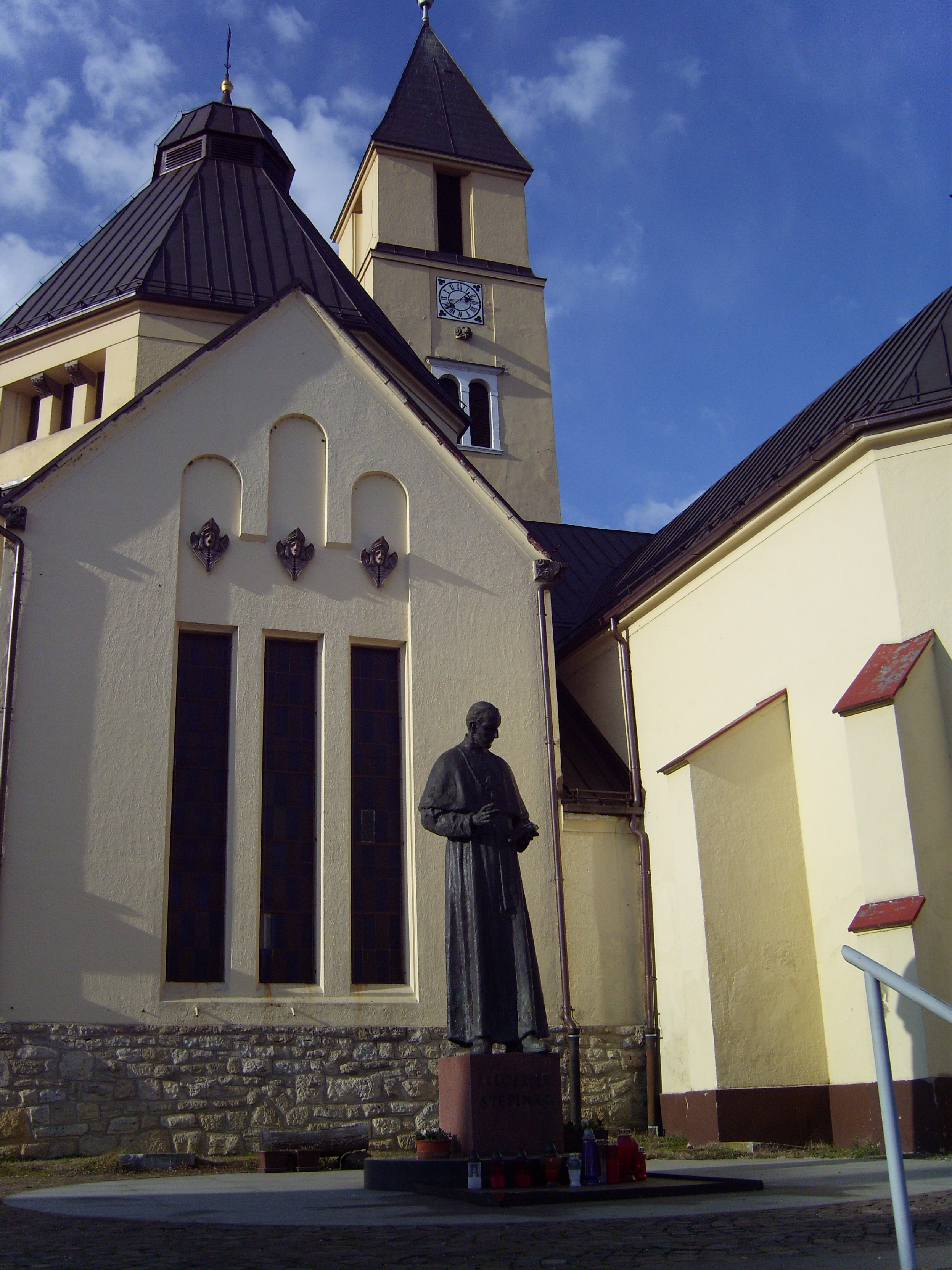 Kirche in Krašić mit der Skulptur von Kardinal Aloisius Stepinac